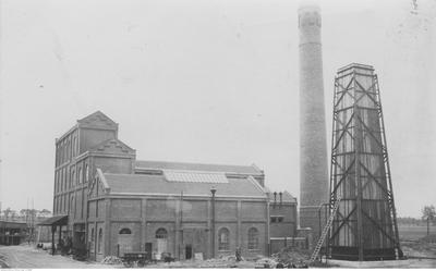 Spalarnia śmieci na Szelągu przy ulicy Wilczak 20 w Poznaniu